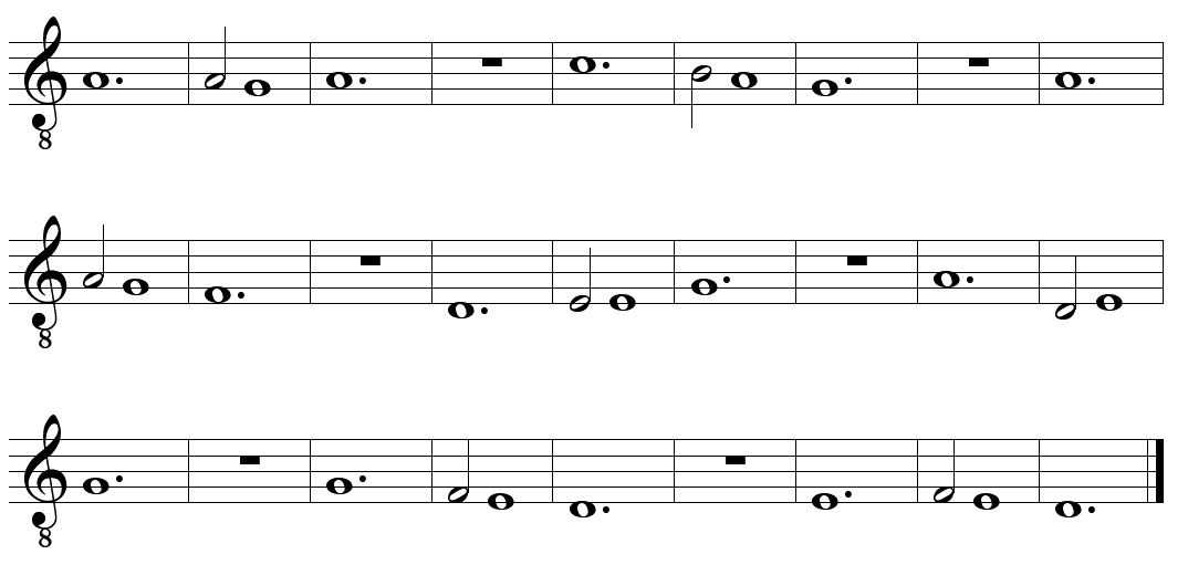 Tenor del Kyrie I dalla Messa di Guillaume de Machaut